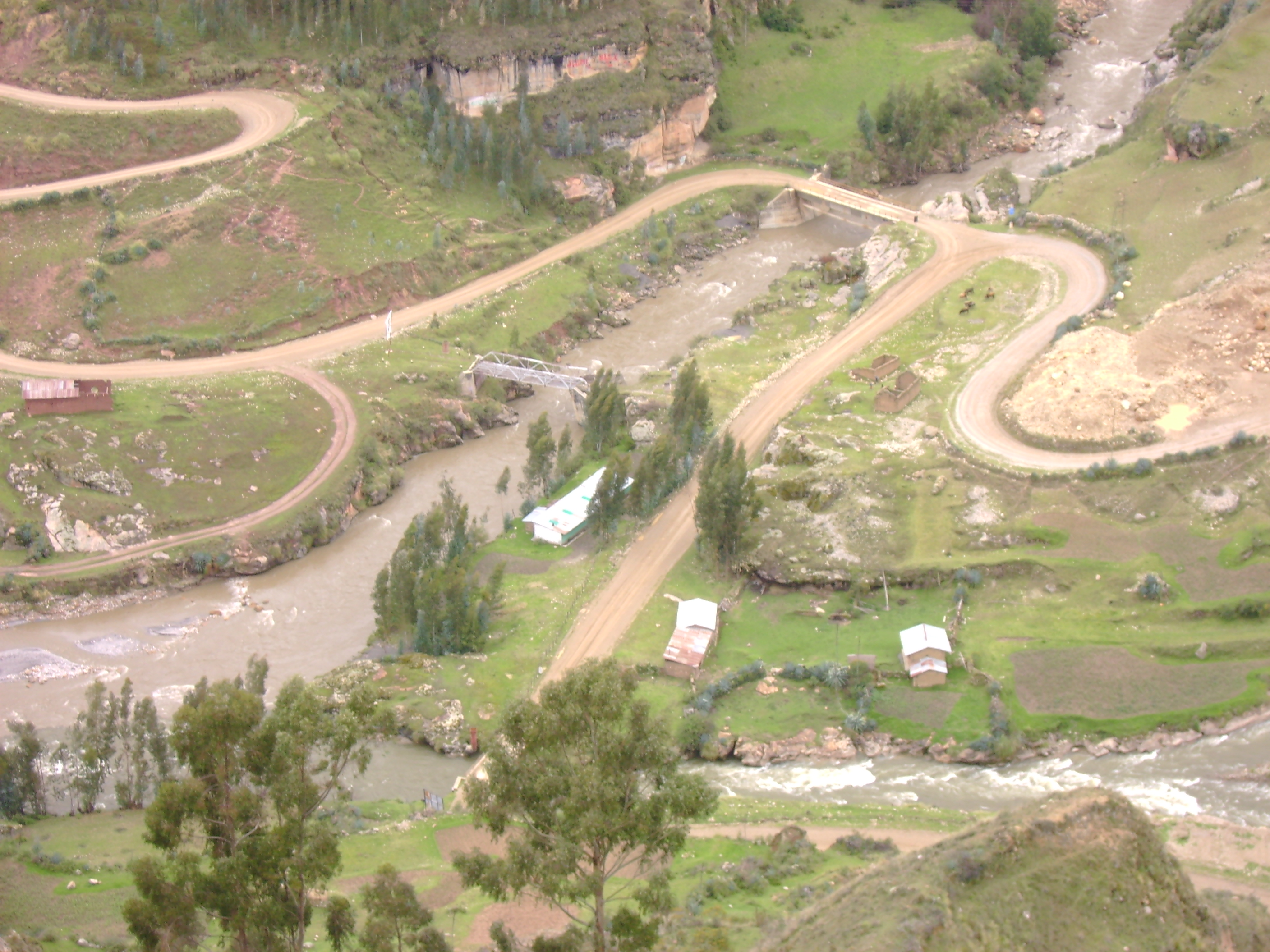 Los río Nupe y Lauricocha se unen para formar el río Marañón.